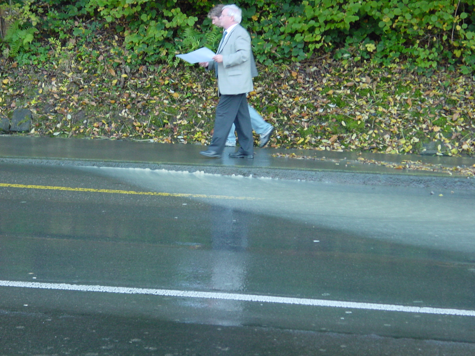 Wasserrohrbruch noch unter dem Asphalt verdeckt